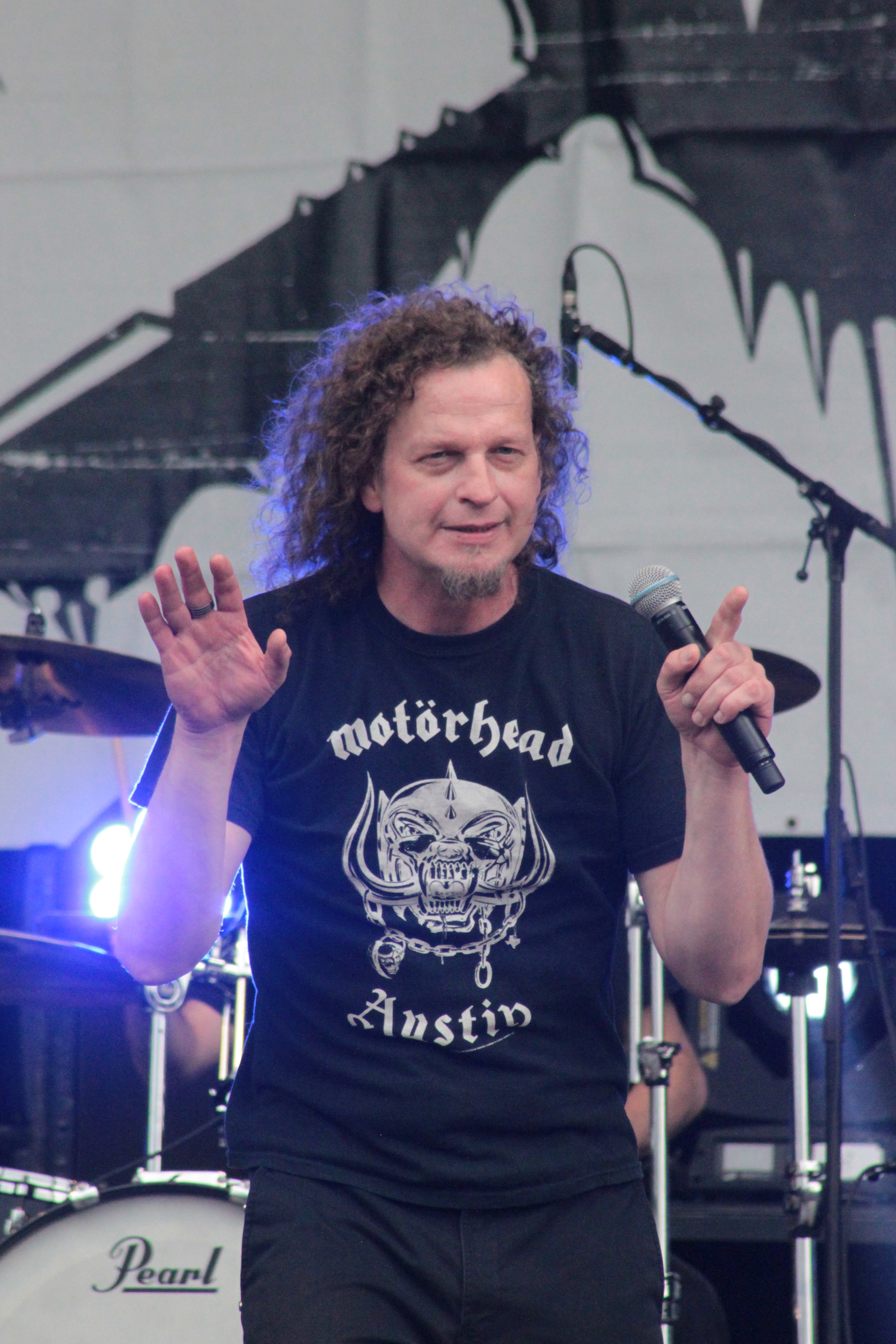 Denis Belanger, Voivod, Hellfest 2013, Fr-44-Clisson.